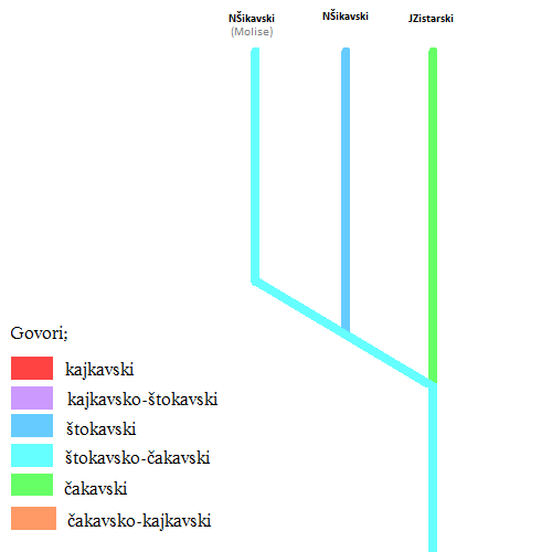 Razvitak i seobe govora Zabiokovlja